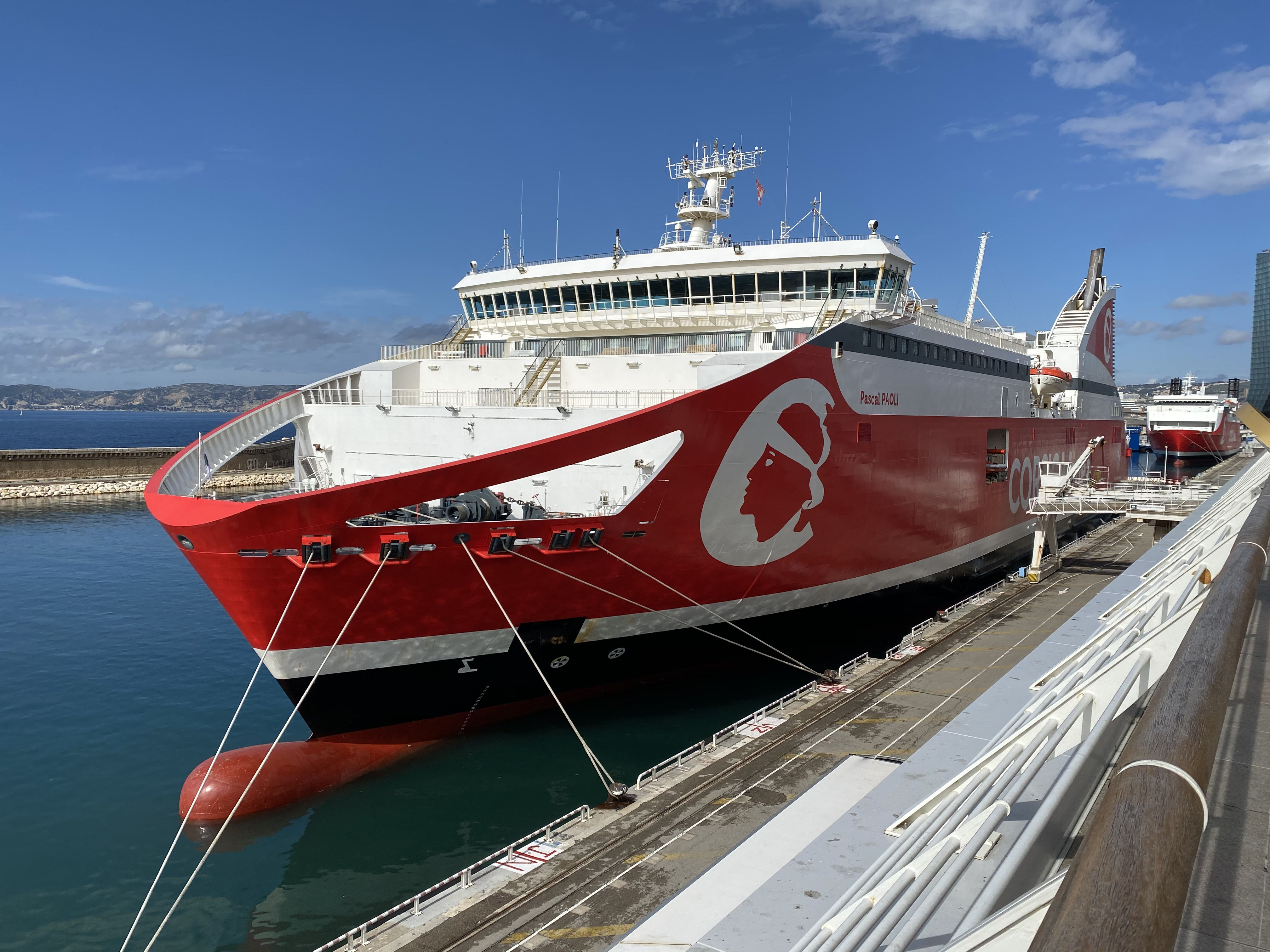 Le cargo mixte Pascal Paoli à Marseille.